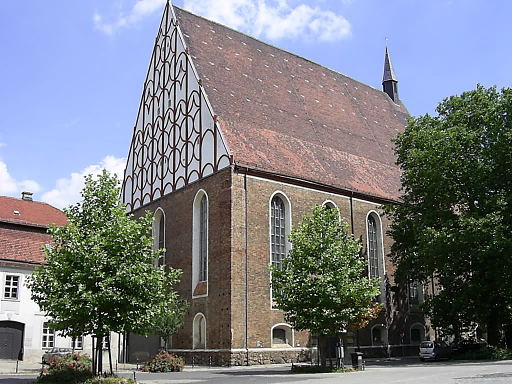 Konzerthalle Carl Philipp Emanuel Bach